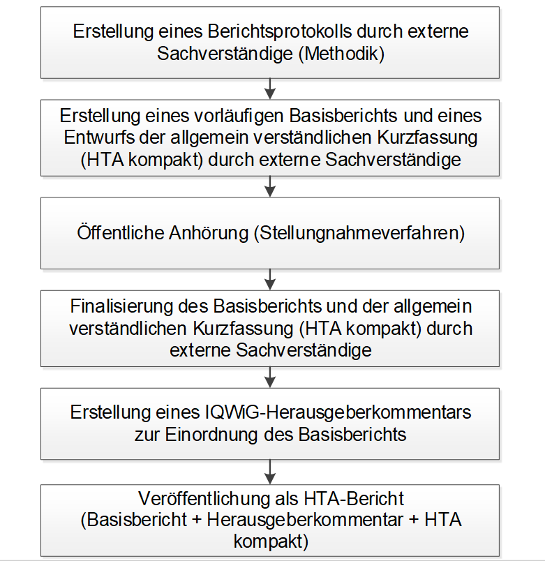 Ablaufdiagramm für die Erstellung eines HTA-Berichts im Rahmen des "ThemenCheck Medizin" beim IQWiG